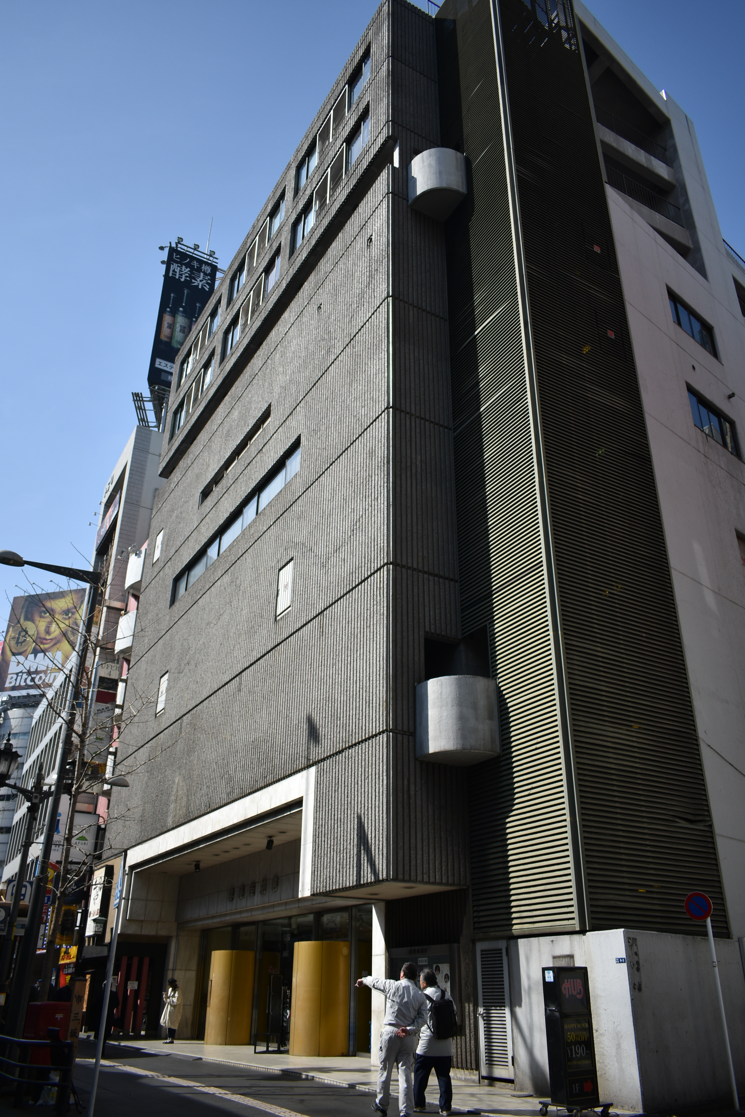 俳優座劇場 Nikon D3400